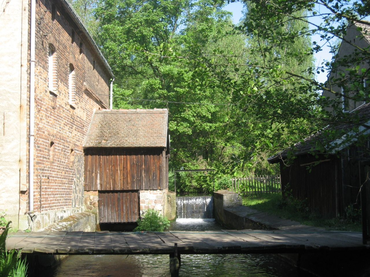 Wassermühle an der Dahme, Brandenburg, Deutschland